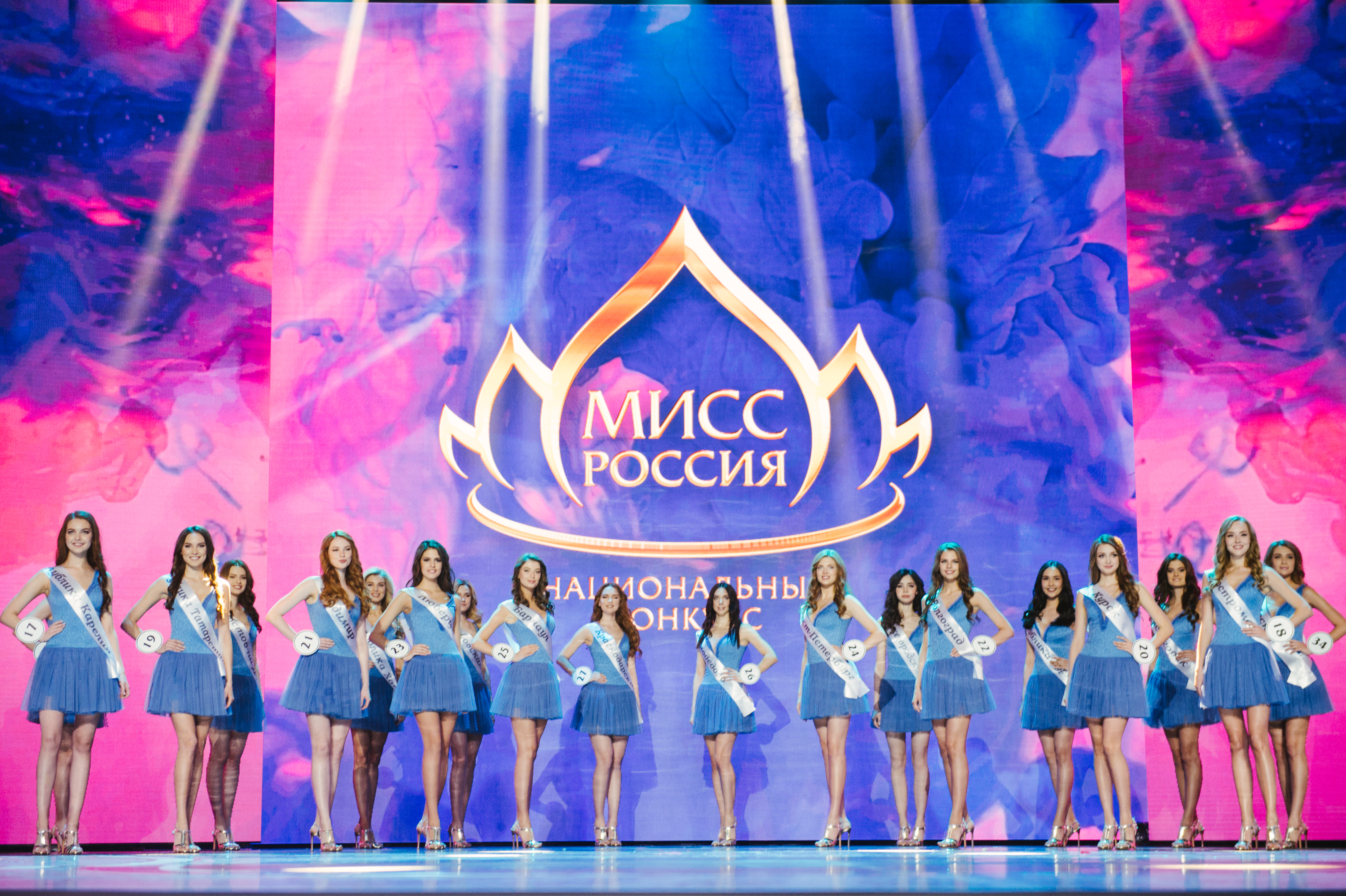 Финалистки конкурса "мисс Россия" 2018